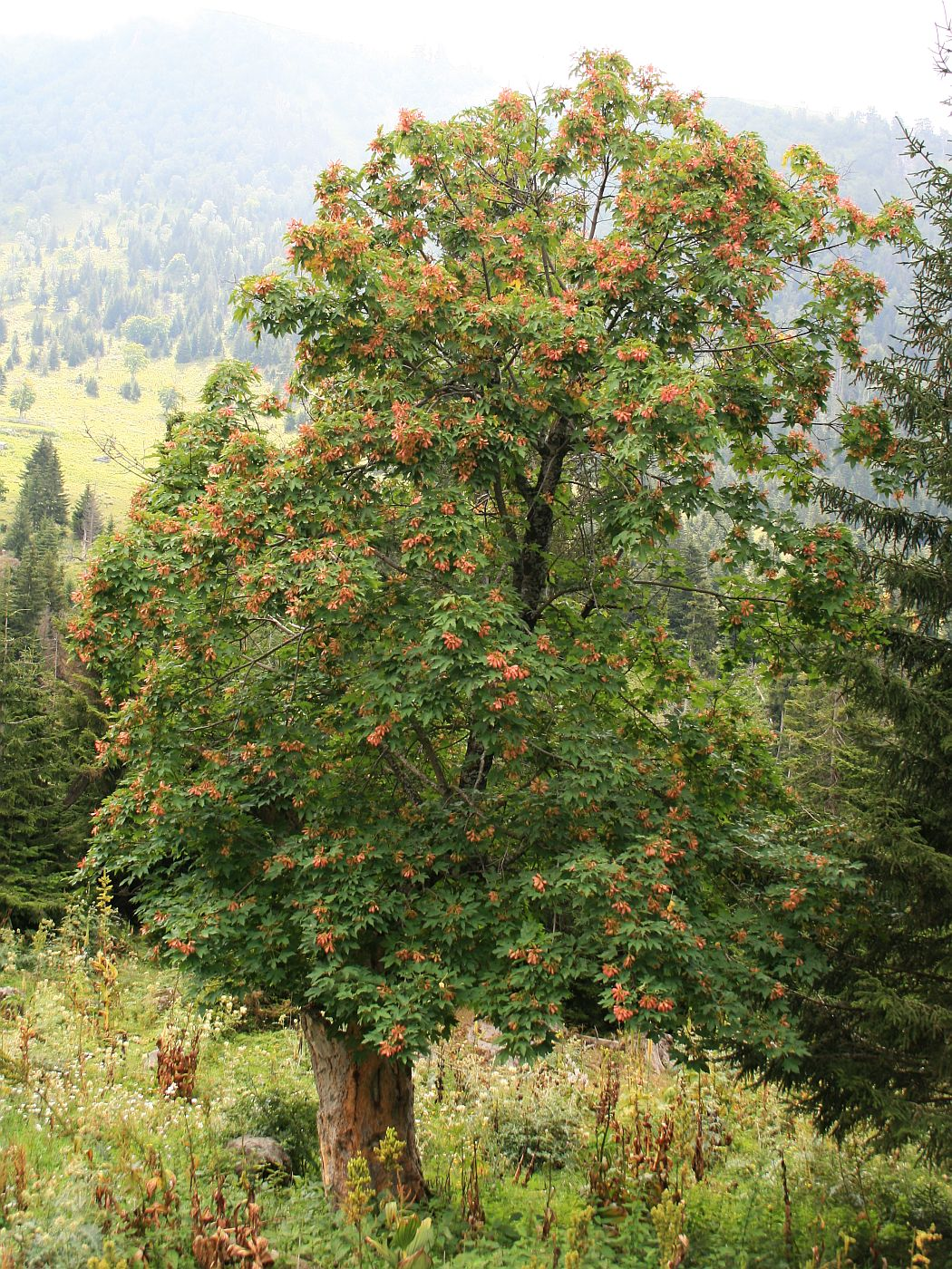 Acer heldreichii subsp. trautvetteri (= Acer trautvetteri), Seifenbaumgewächse (Sapindaceae) – Georgien/საქართველო: Kleiner Kaukasus, ca. 4,4 km ESE Sakire/საკირე, ca. 13 km SSW Borjomi/ბორჯომი, ca. 1925 m s.m.